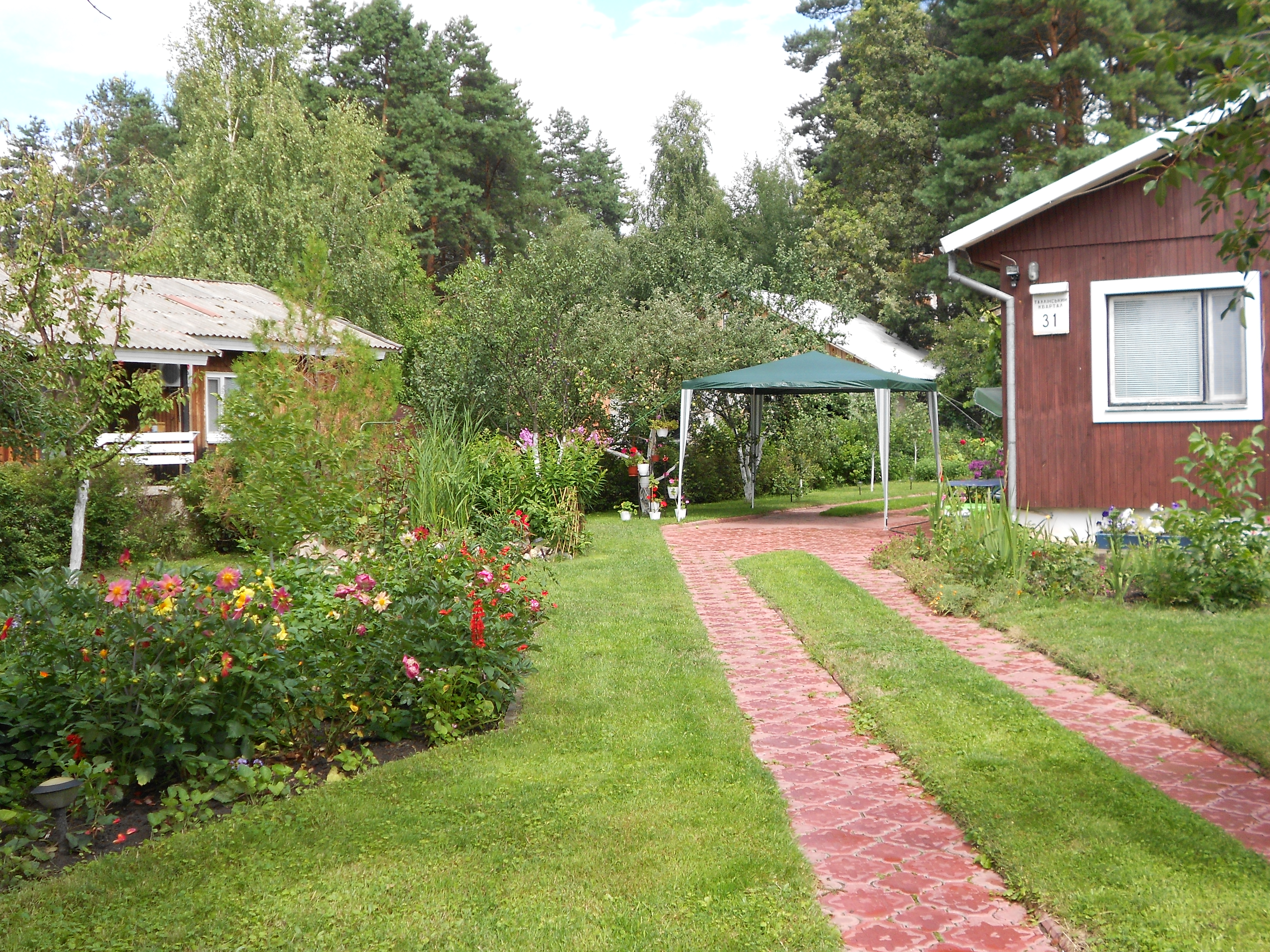 Котеджі у Славутичі, 22-07-2013. Талліннський квартал.